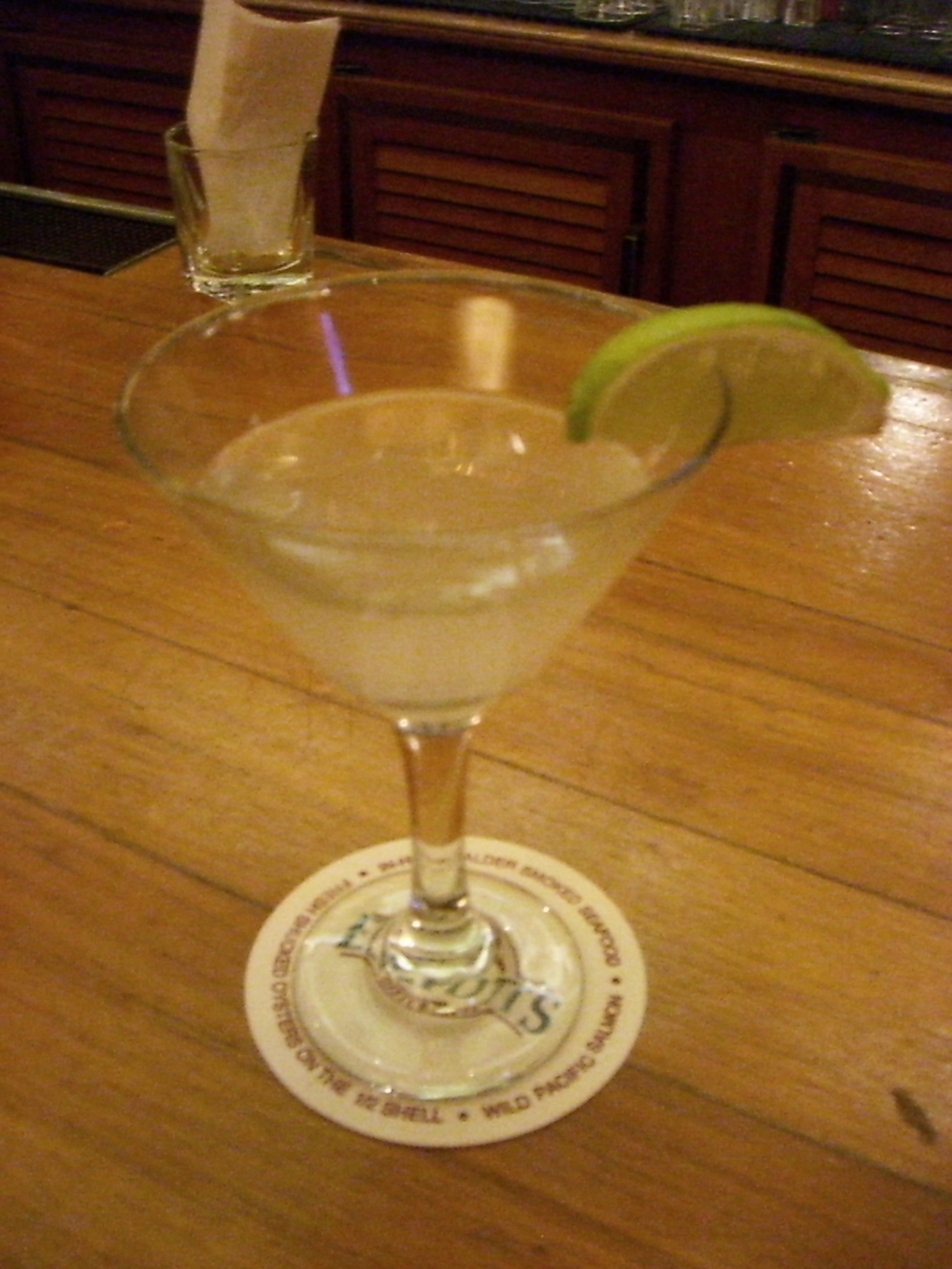 Daiquiri cocktail